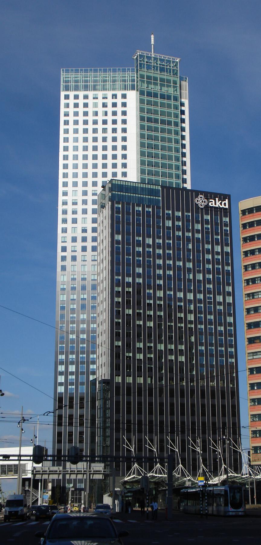 Rotterdam, Maastoren.